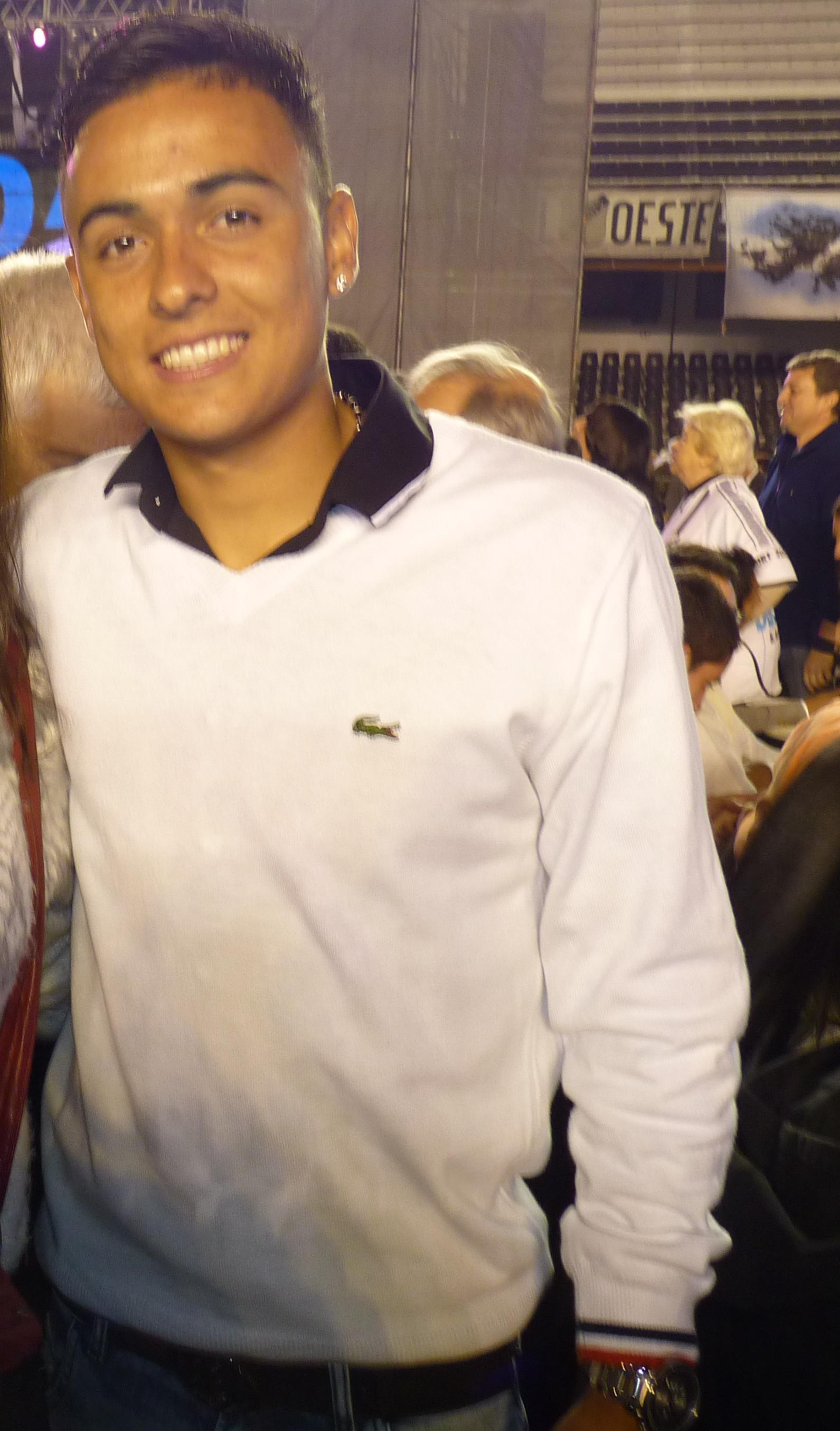 Foto de Santiago Montoya Muñoz en la fiesta del centenario del Club Atlético All Boys.